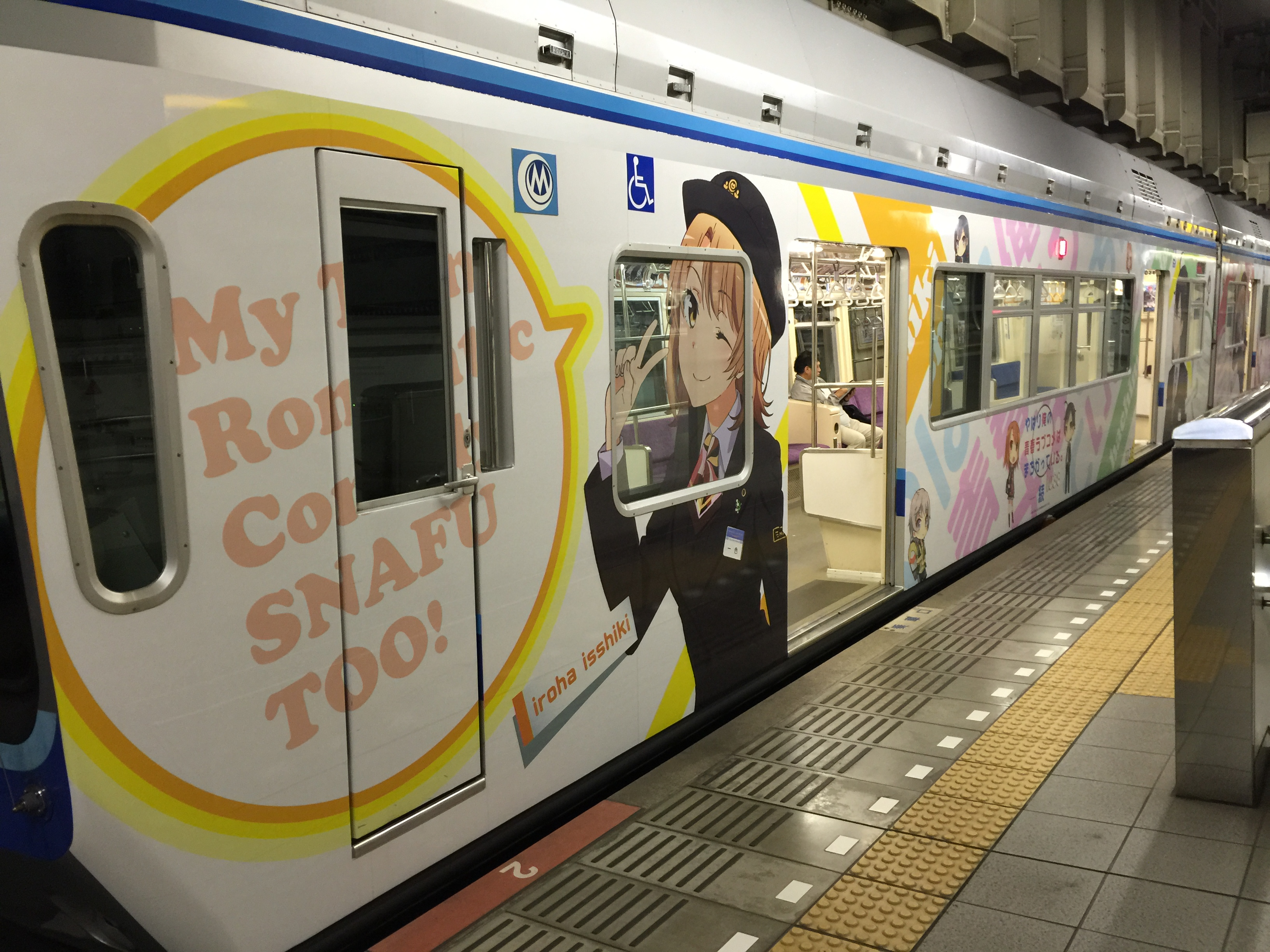 千葉モノレールアニメ「やはり俺の青春ラブコメはまちがっている。」ラッピング。